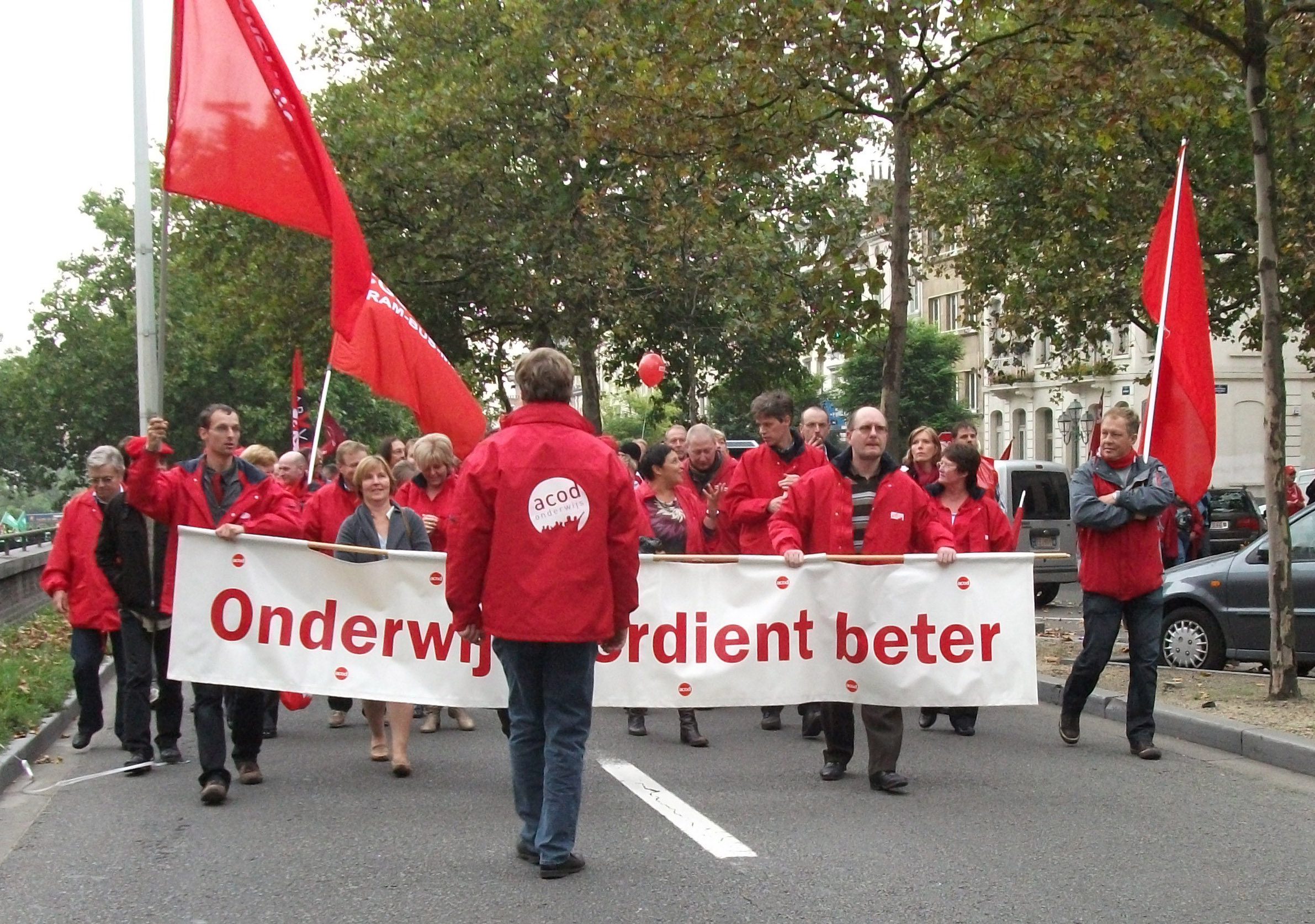 Manifestation européenne de Bruxelles en septembre 2010, ACOD syndicat d"enseignement belge.